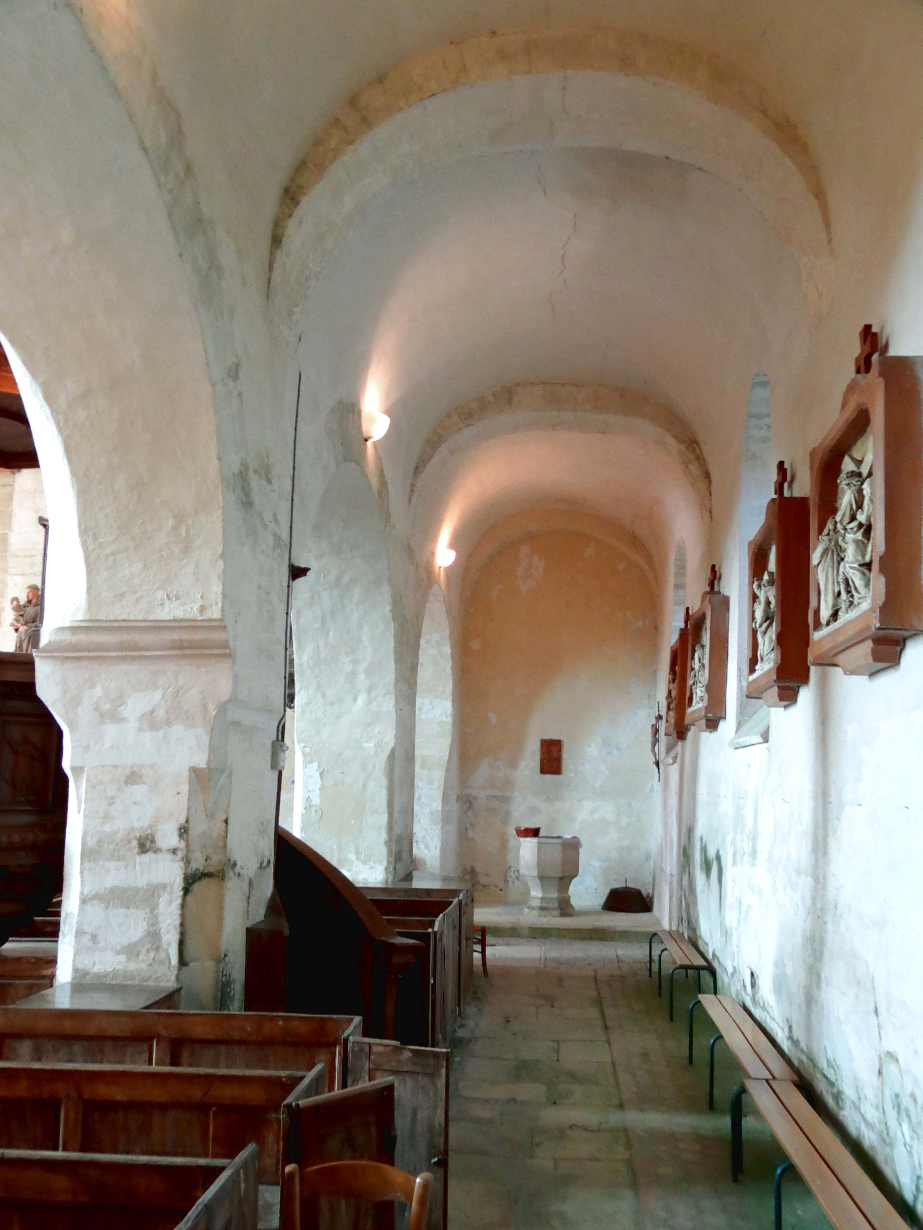 Intérieur de l'église - voir titre.